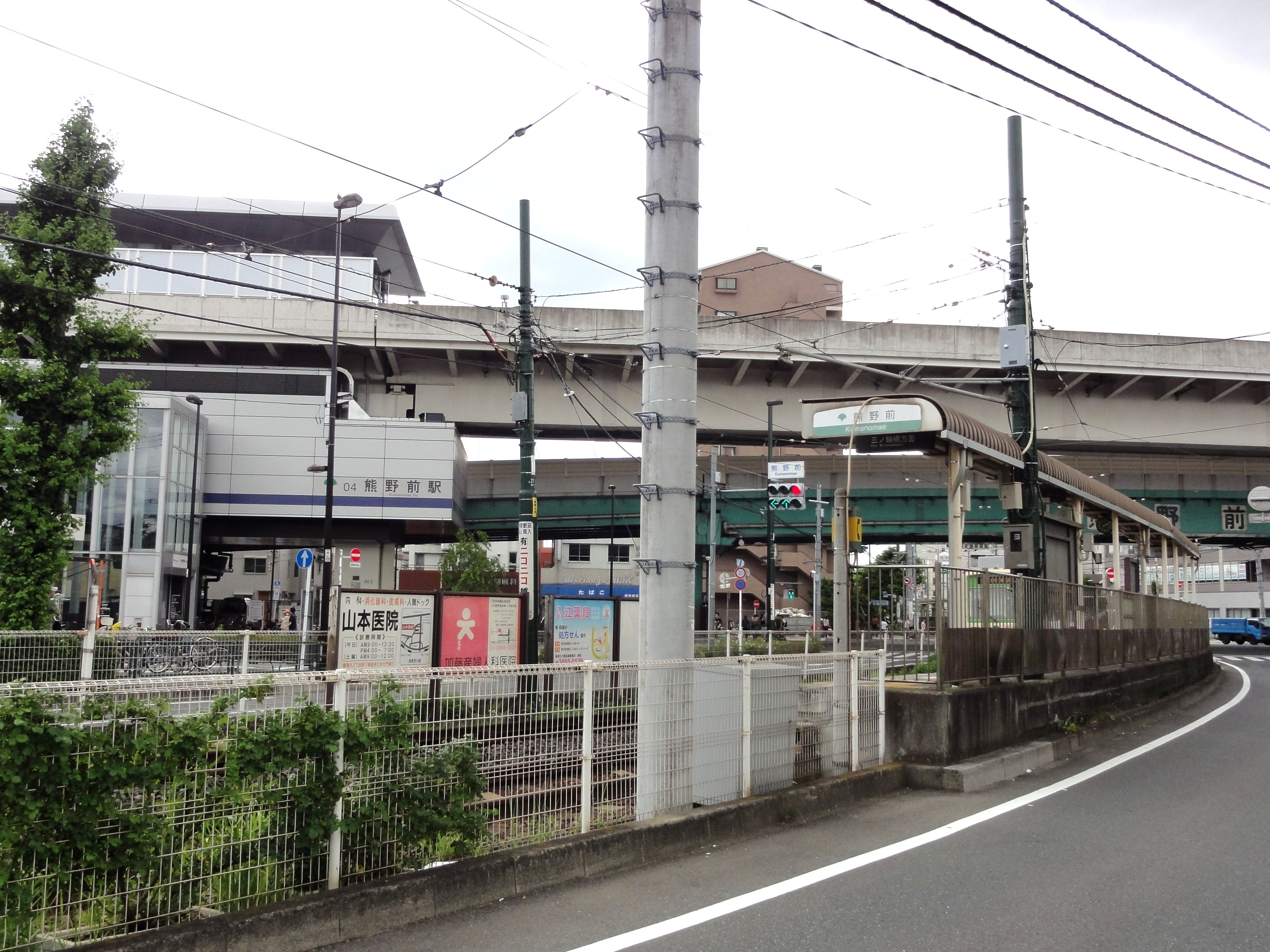 都電荒川線熊野前駅（三ノ輪橋方面）